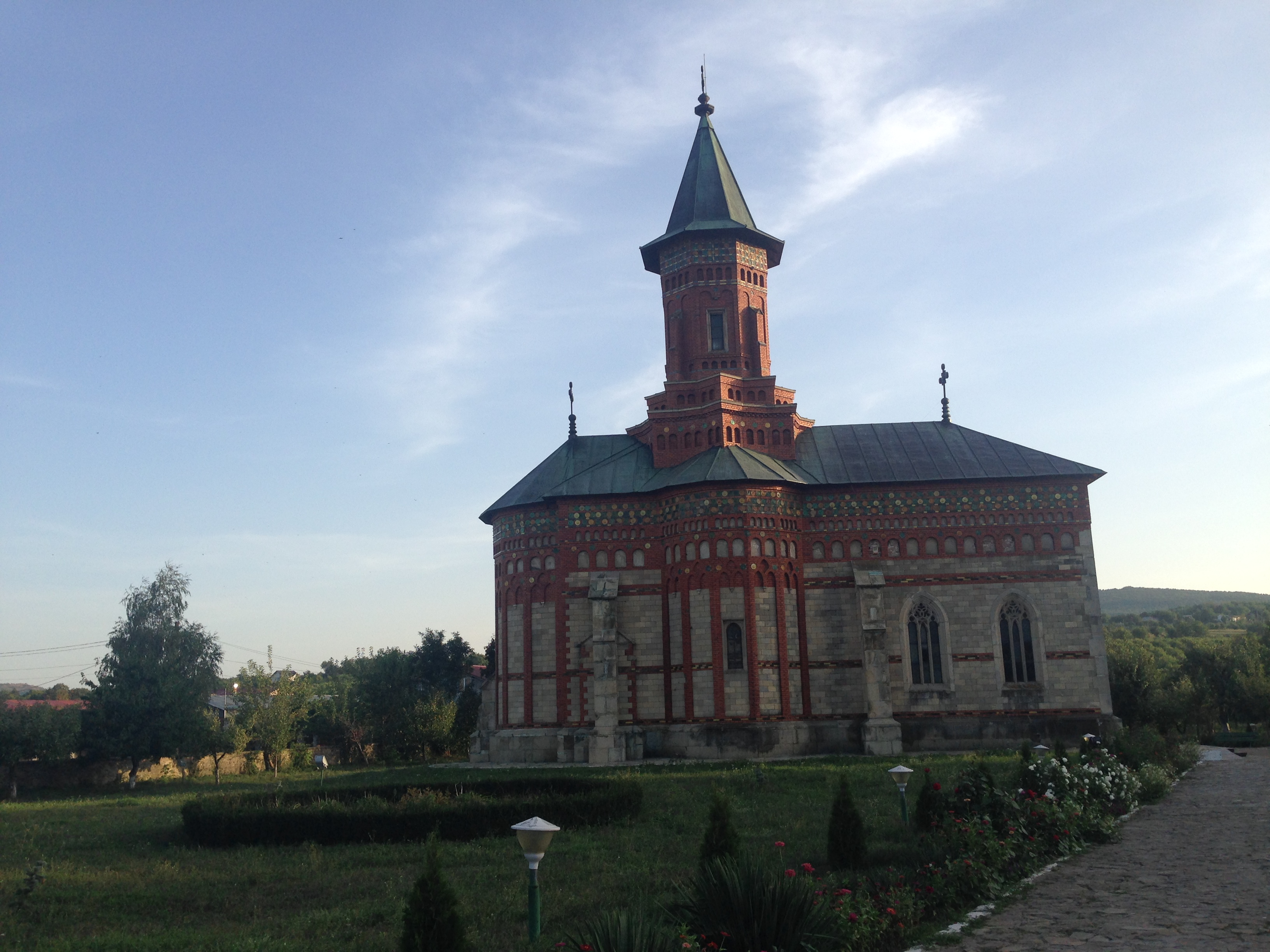 Biserică ridicată de Ștefan Cel Mare în 1492. Sitaută central, la 1 minute de acest monument se află hotelul și restaurantul Rareșoaia, după numele amantei domnitorului român. 01